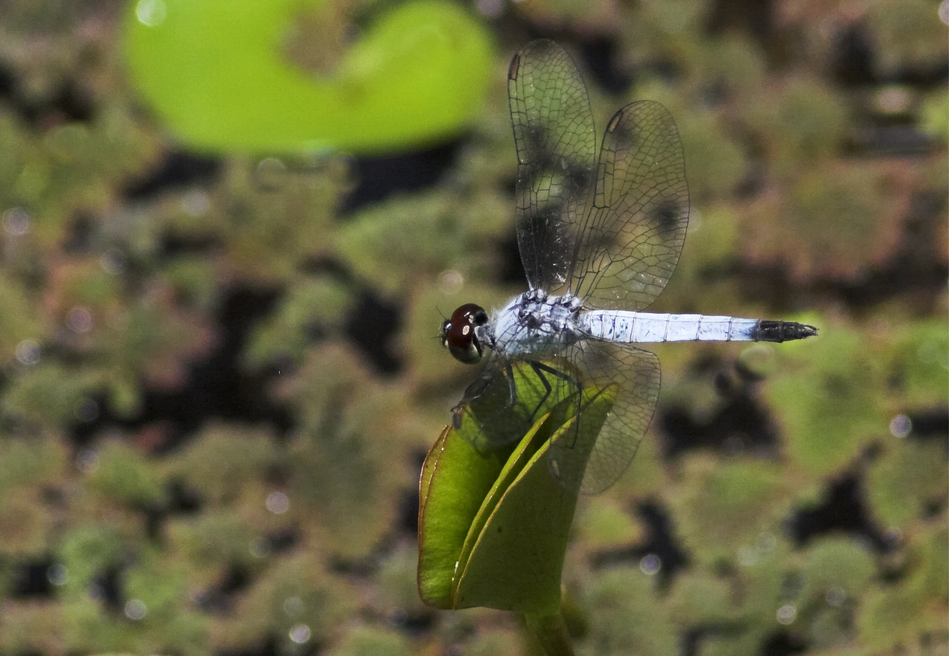 male Brachydiplax denticauda